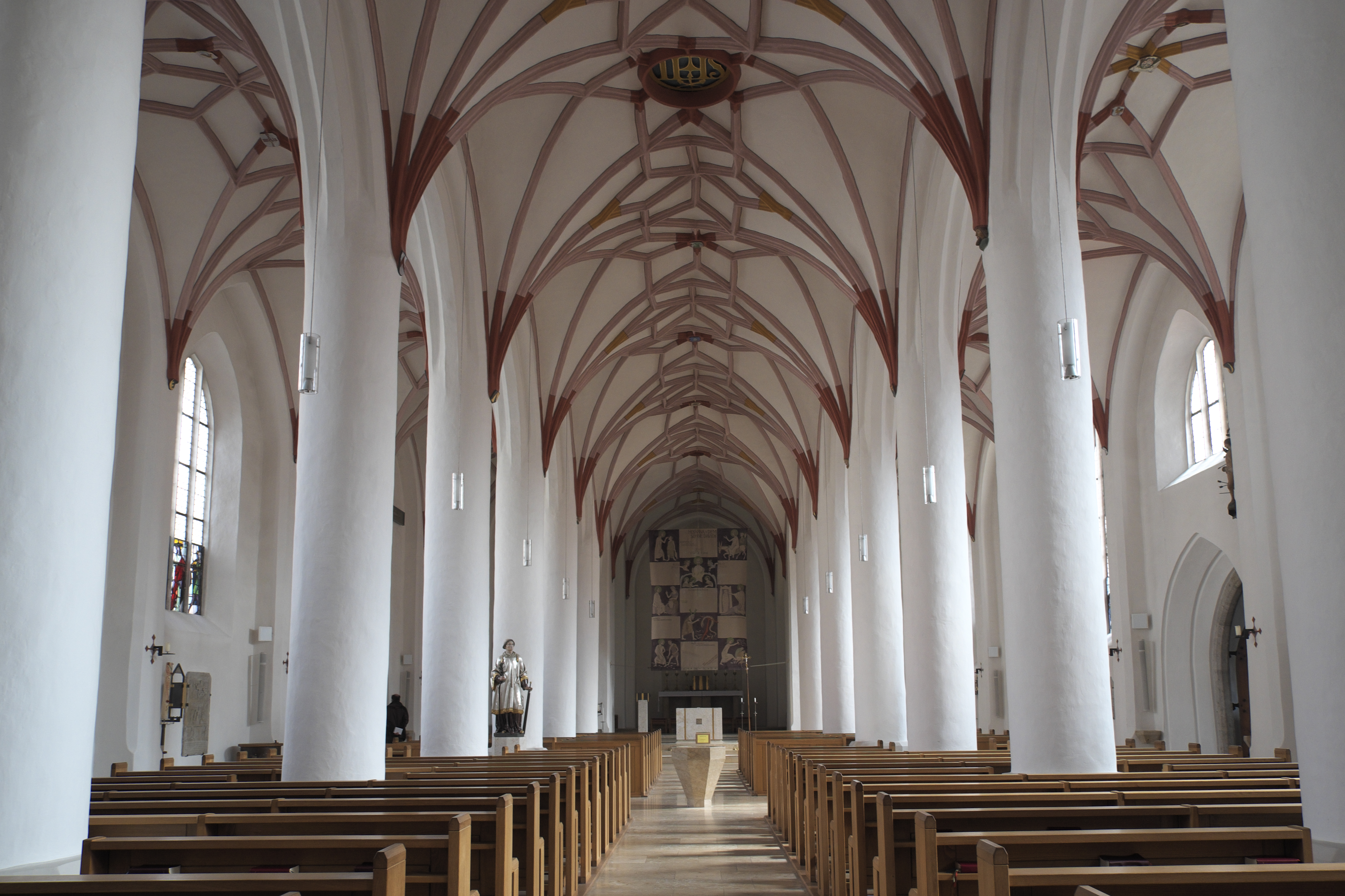 Katholische Pfarrkirche St. Laurentius in Neustadt an der Donau im niederbayerischen Landkreis Kelheim (Bayern/Deutschland), Innenraum